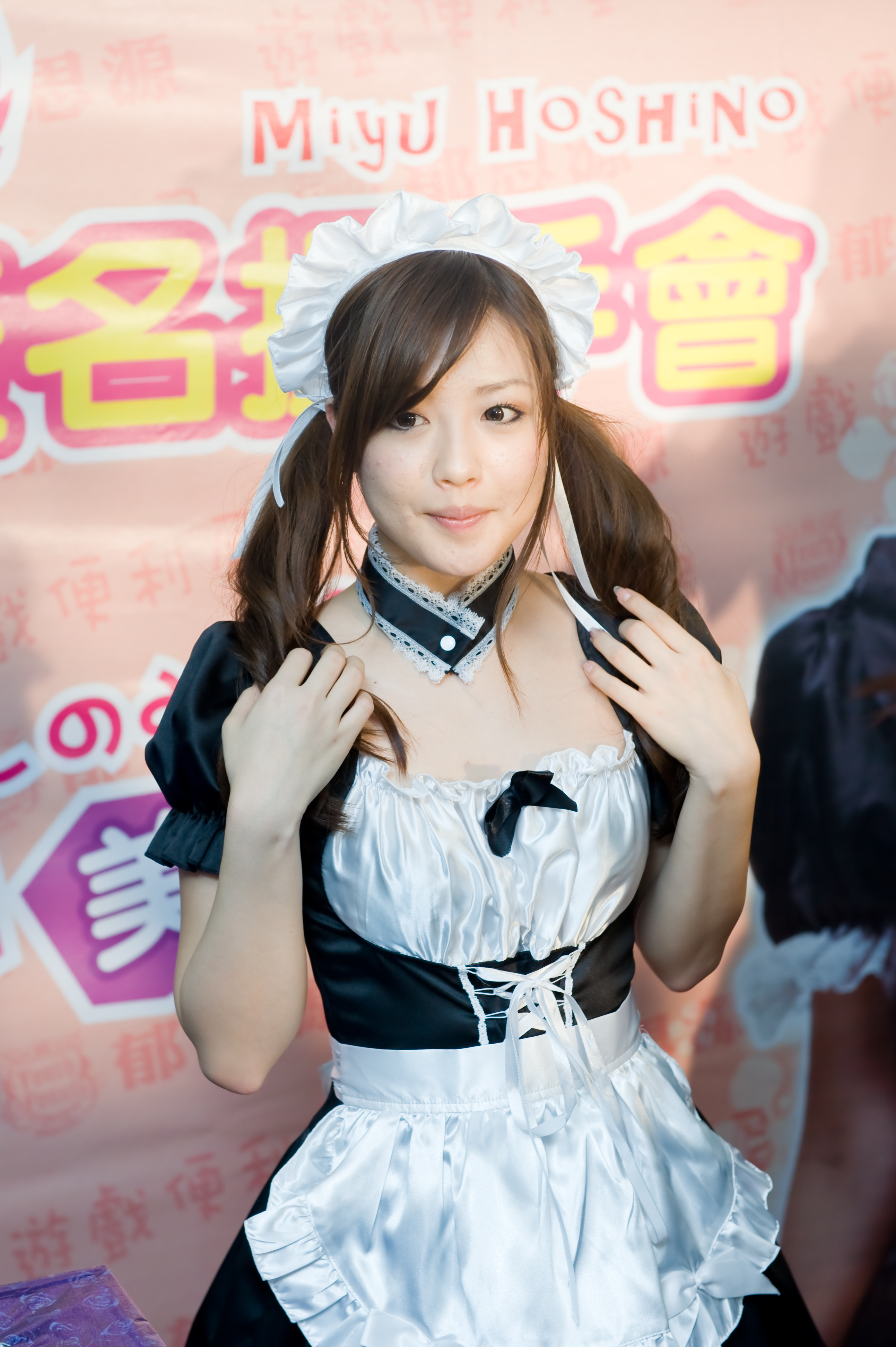 ほしのみゆ